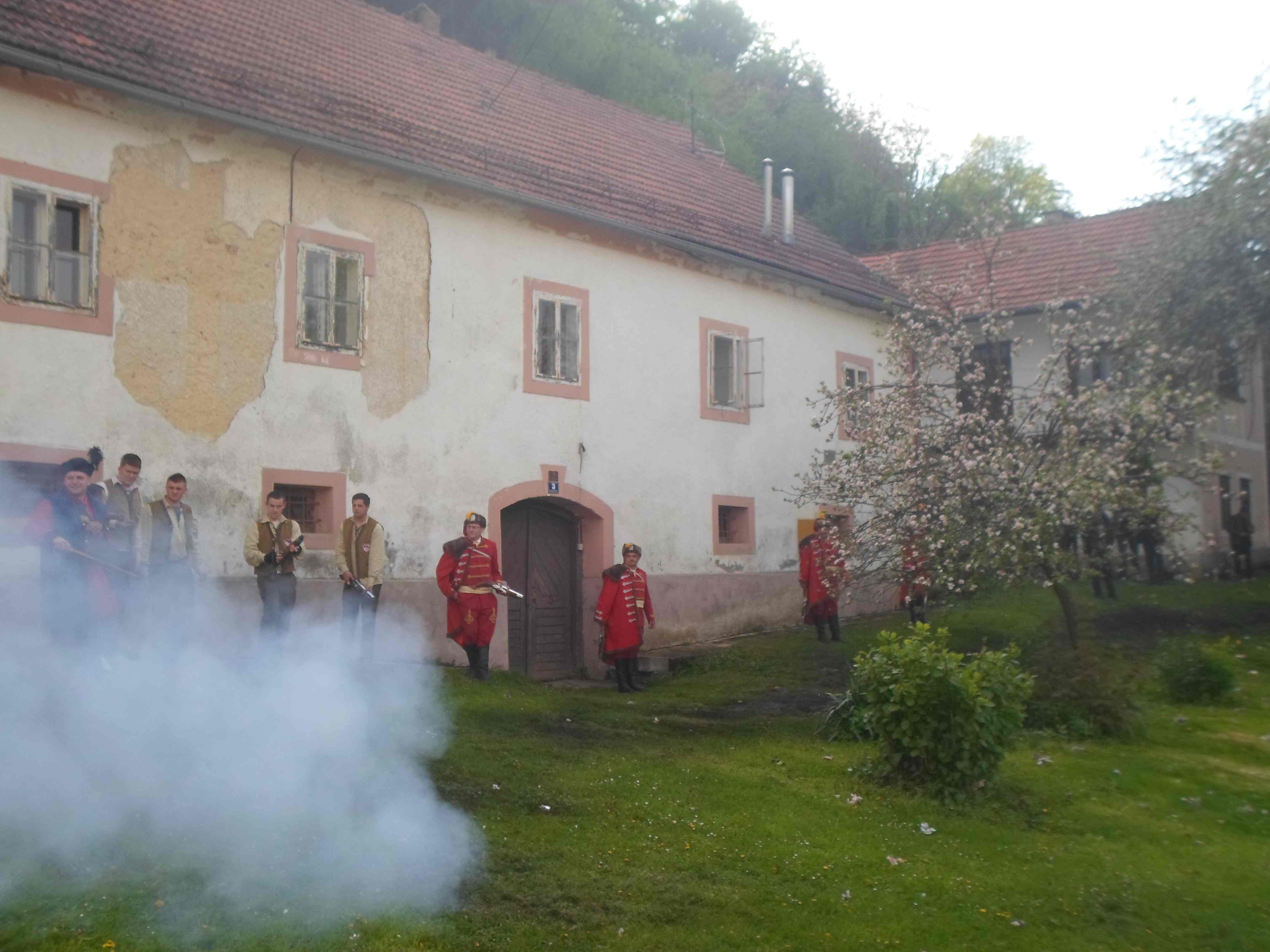 Pistola Kostelgrad, Uskrs 2014, Hrvatska